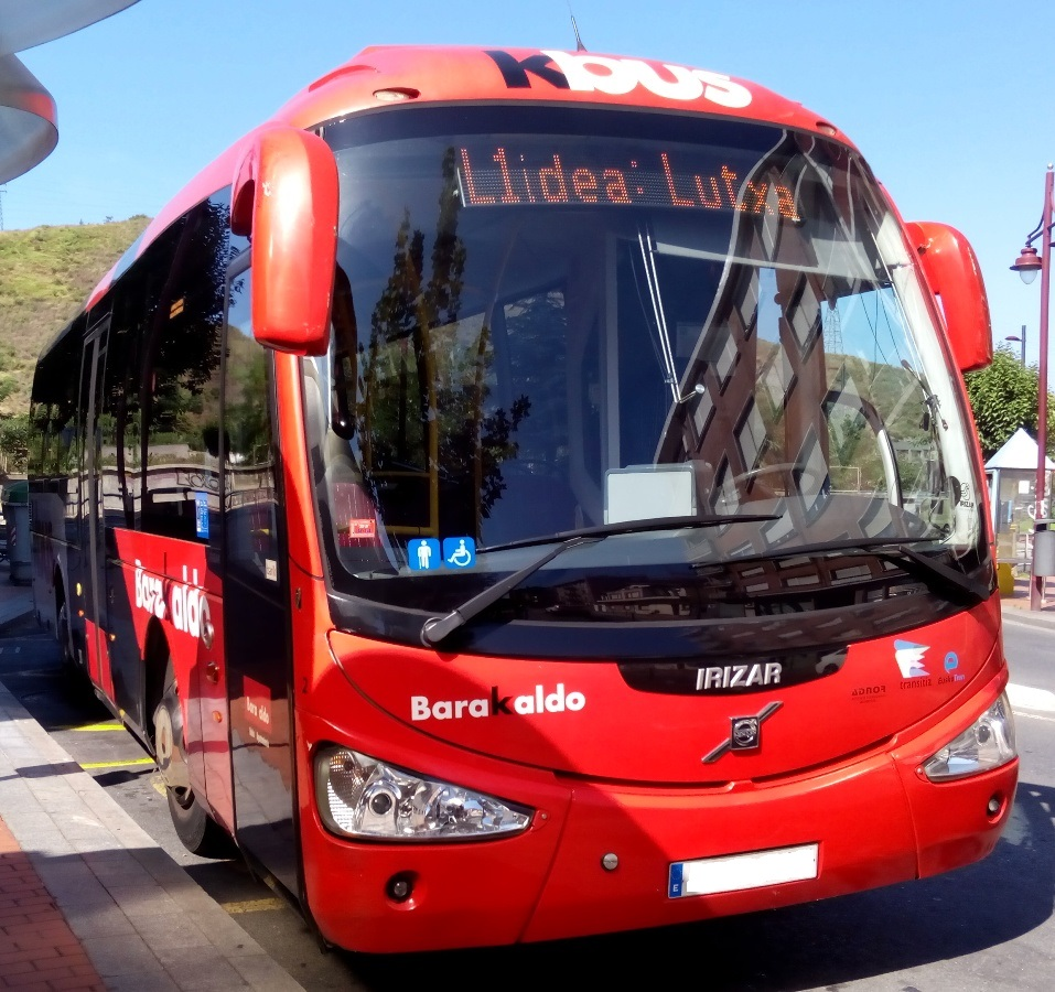 Autobus Irizar de KBUS en Lutxana